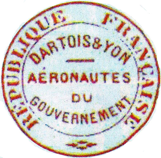 Fotografia proveniente da collezione personale dell'autore raffigurante un timbro di aerostato dei ballon montè